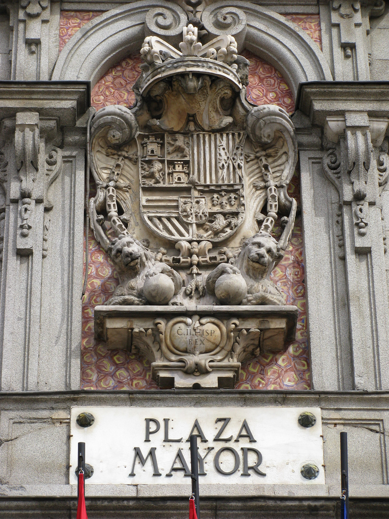 Escudo situado en la fachada de la casa de la Panadería, en la Plz. Mayor de Madrid. El escudo está compuesto por las armas de Castilla y de León, en el primer cuadrante; las armas de Aragón y Sicilia, en el segundo; las armas de Austria y de la Borgoña moderna, en el tercero; las de la Borgoña antigua y Brabante, en el cuarto, las de Flandes y las de Tirol en el escusón de abajo y el símbolo de Granada en el centro del escudo.(Fuente Wikipedia)